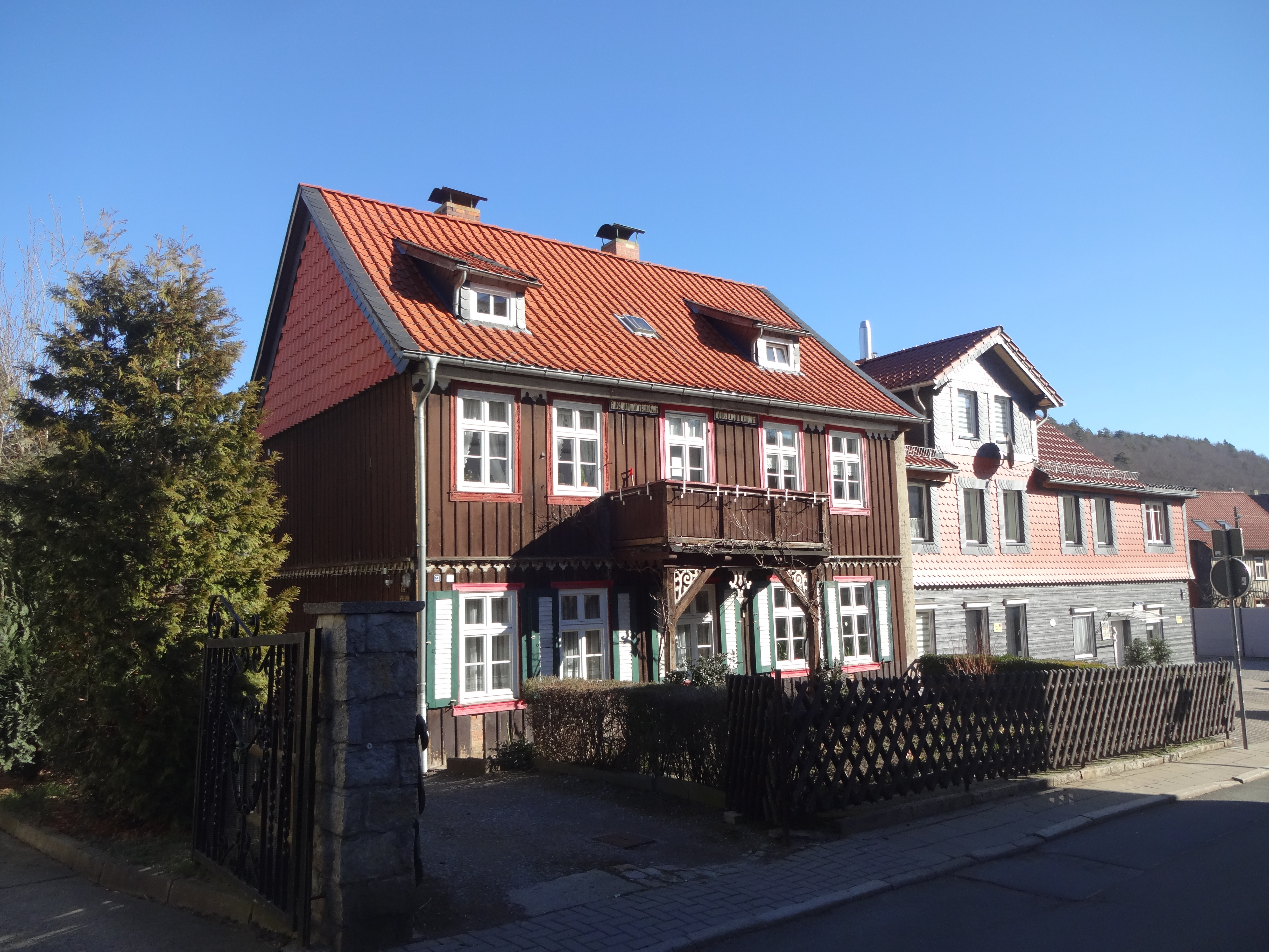 ehemals denkmalgeschütztes Pfarrhaus in der Lindenbergstraße 23 in Wernigerode